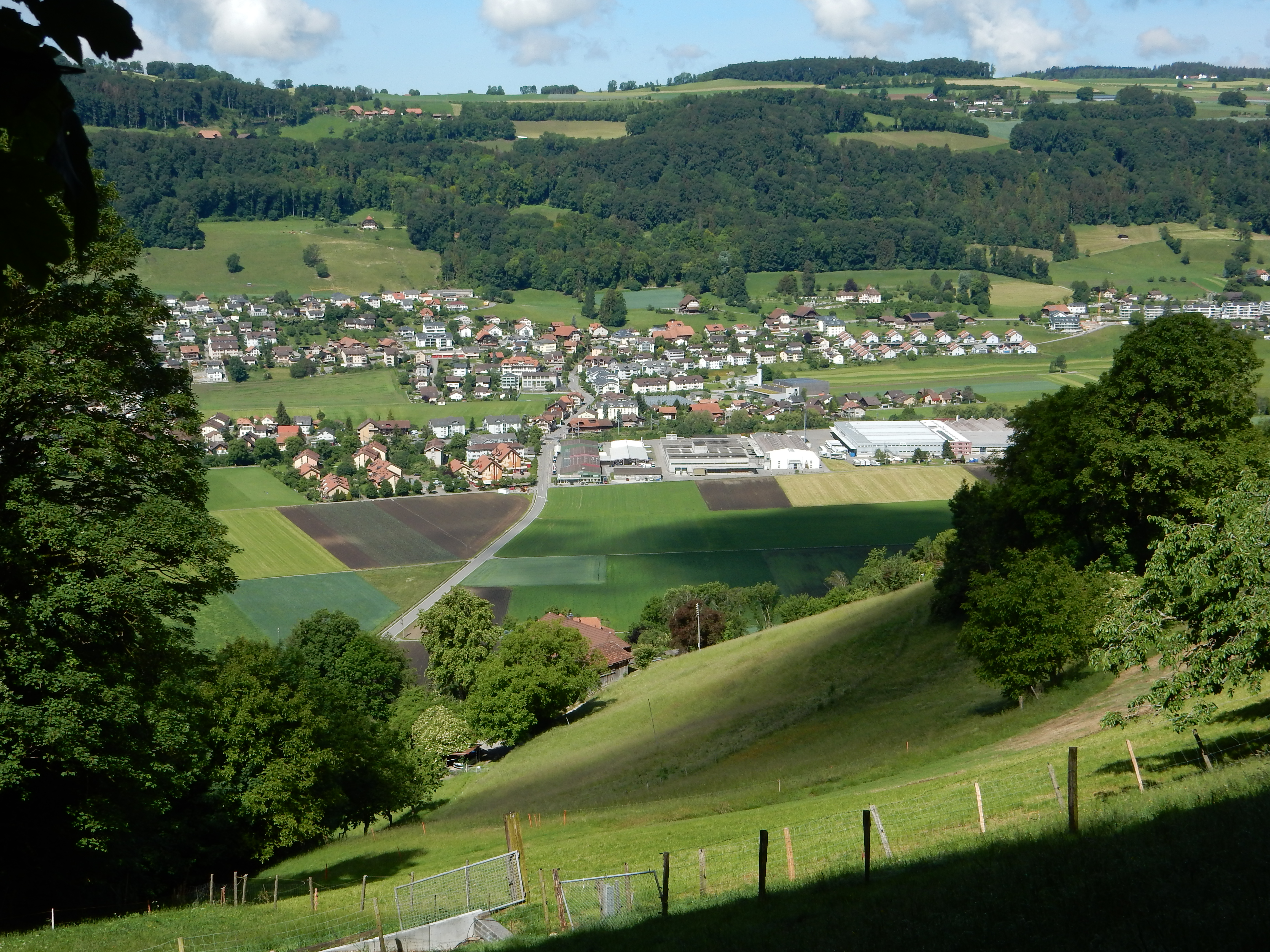 Toffen vom Belpberg aus gesehen, gegenüber der Längenberg.